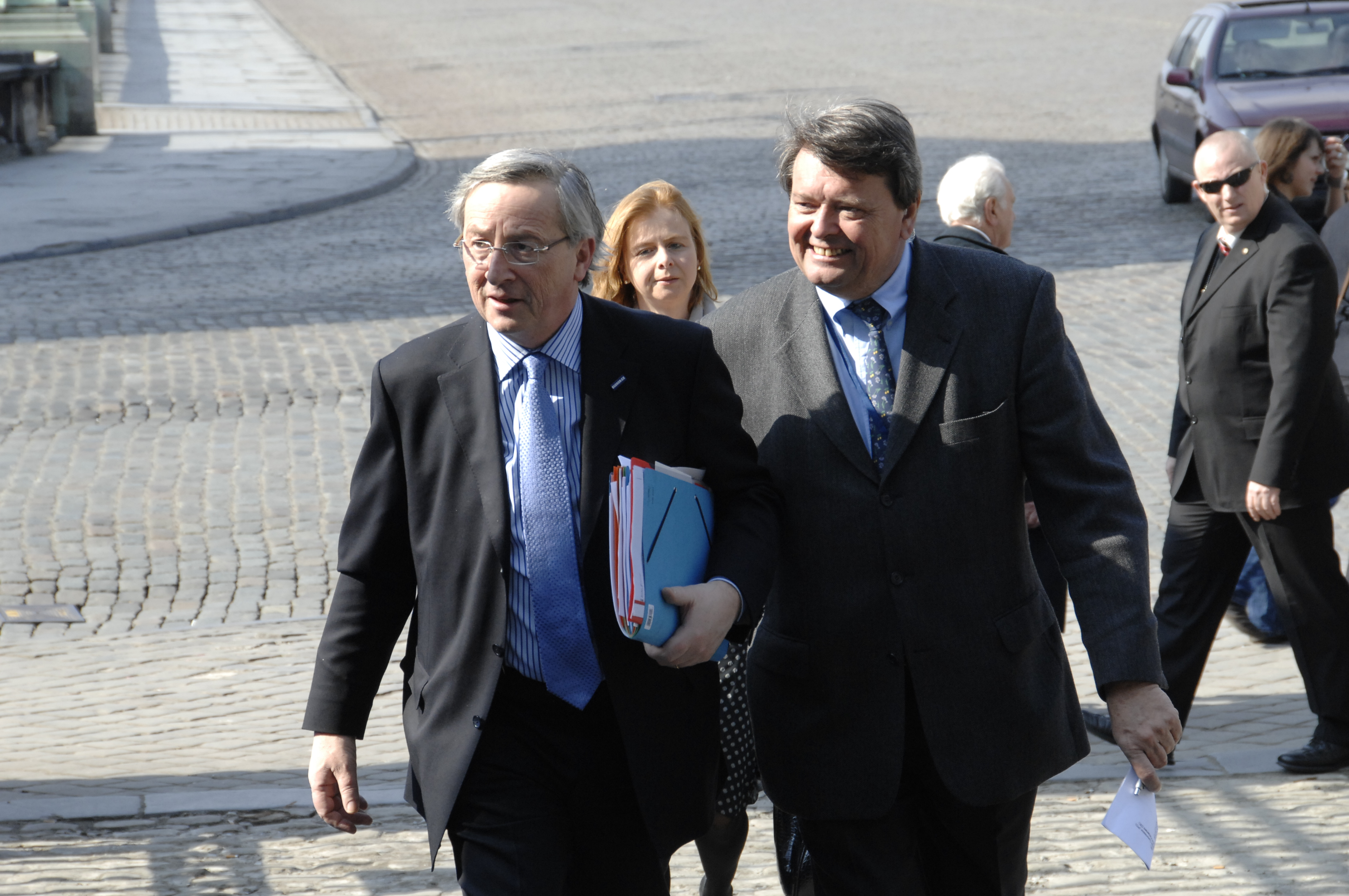 EPP Summit 19 March 2009